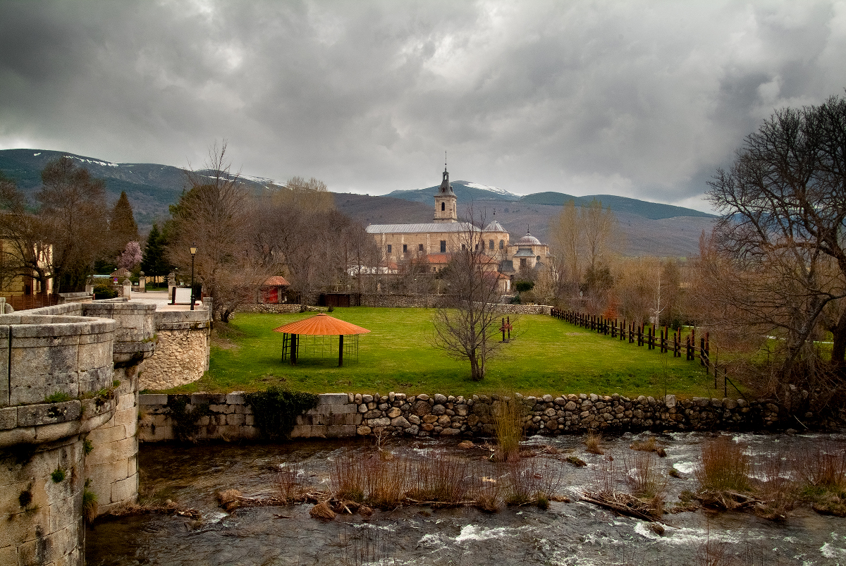 Vista del Monasterio de Santa María del paular junto al río Lozoya y el puente del Perdón.